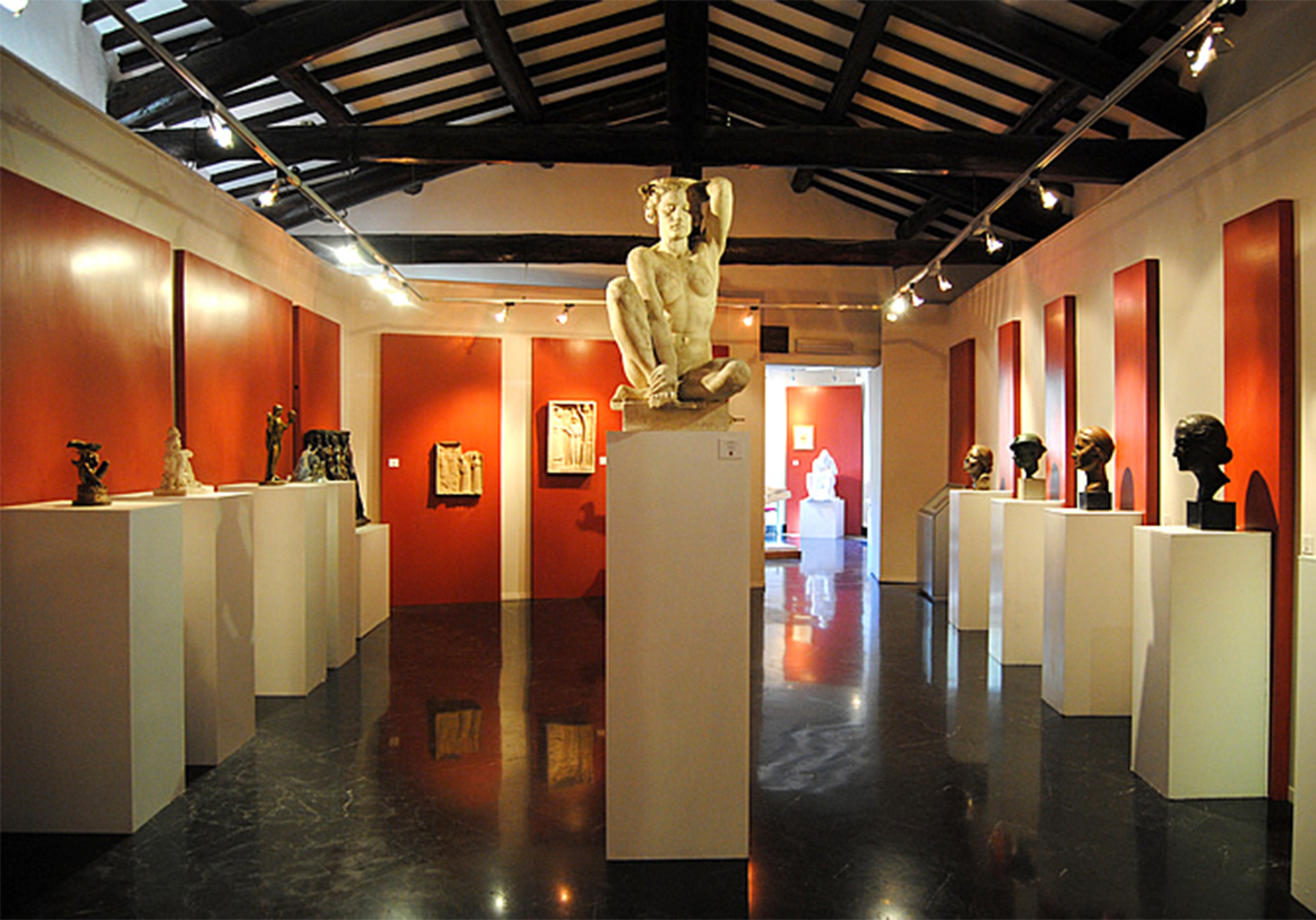 Una delle sale dedicate alle mostre temporanee. Mstra di scultura al Museo di Anticoli Corrado (2015).